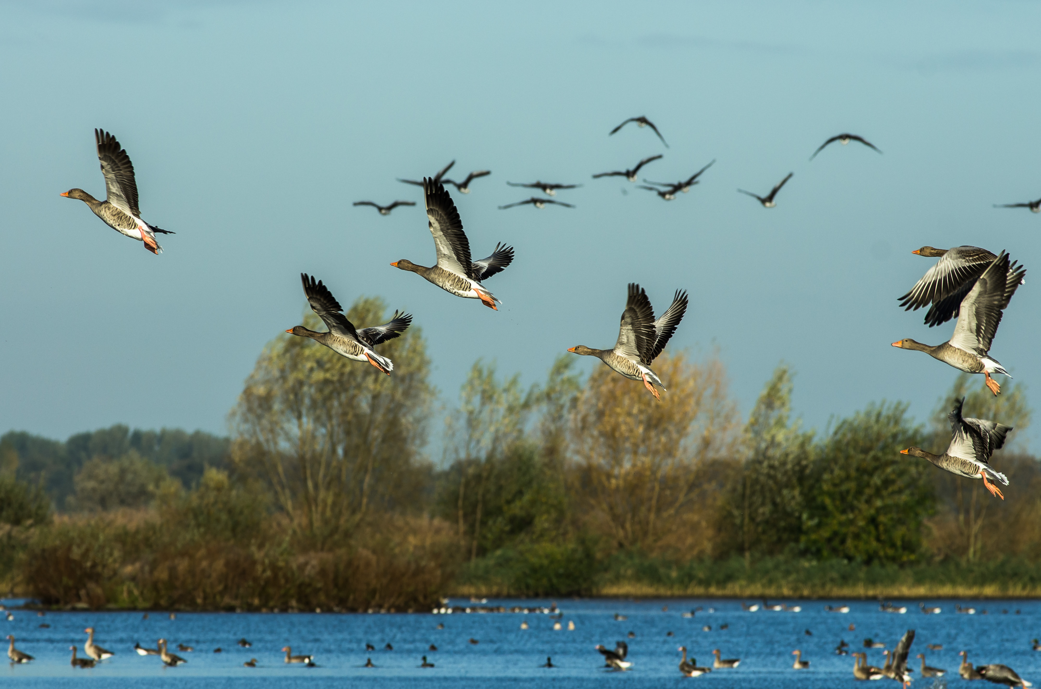 Die Rieselfelder in Münster - jedes Jahr ein Erlebnis, wenn die Zugvögel dort rasten